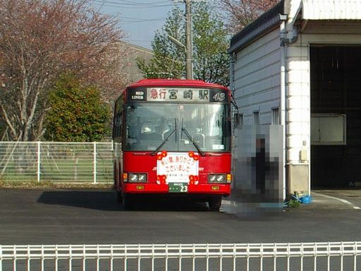 廃止日前日のＪＲ九州バス宮林線小林駅車庫